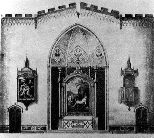 Altarwand der Schlosskirche Neustrelitz mit dem Altargemälde "Die Grablegung" von Georg Kannengiesser und der "Heiligen Familie (links), einer Kopie nach Raffael von Grossherzogin Marie, sowie der ursprünglichen Wanddekoration Buttels